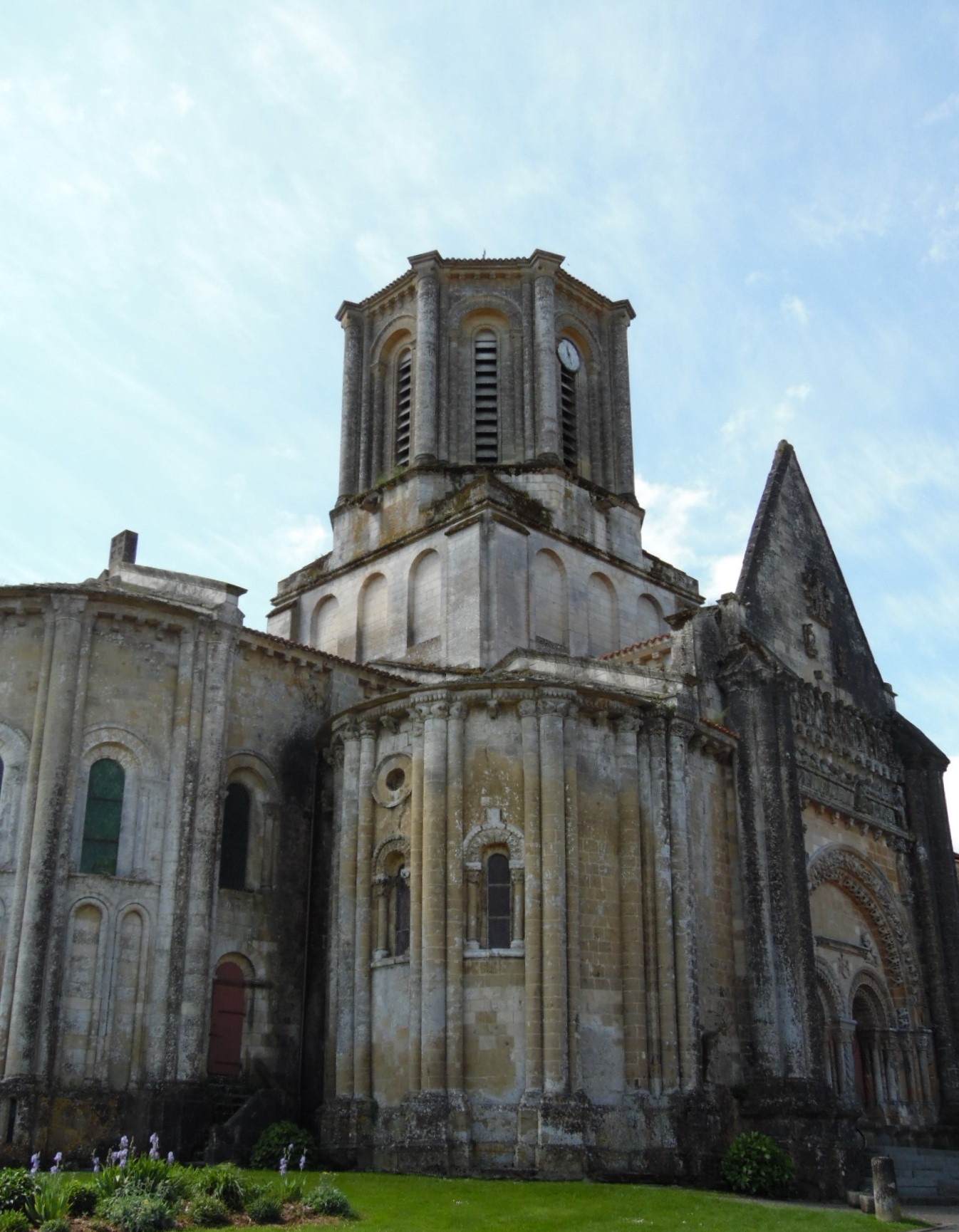 Vue du portail et de deux des trois absides de l'église Notre Dame